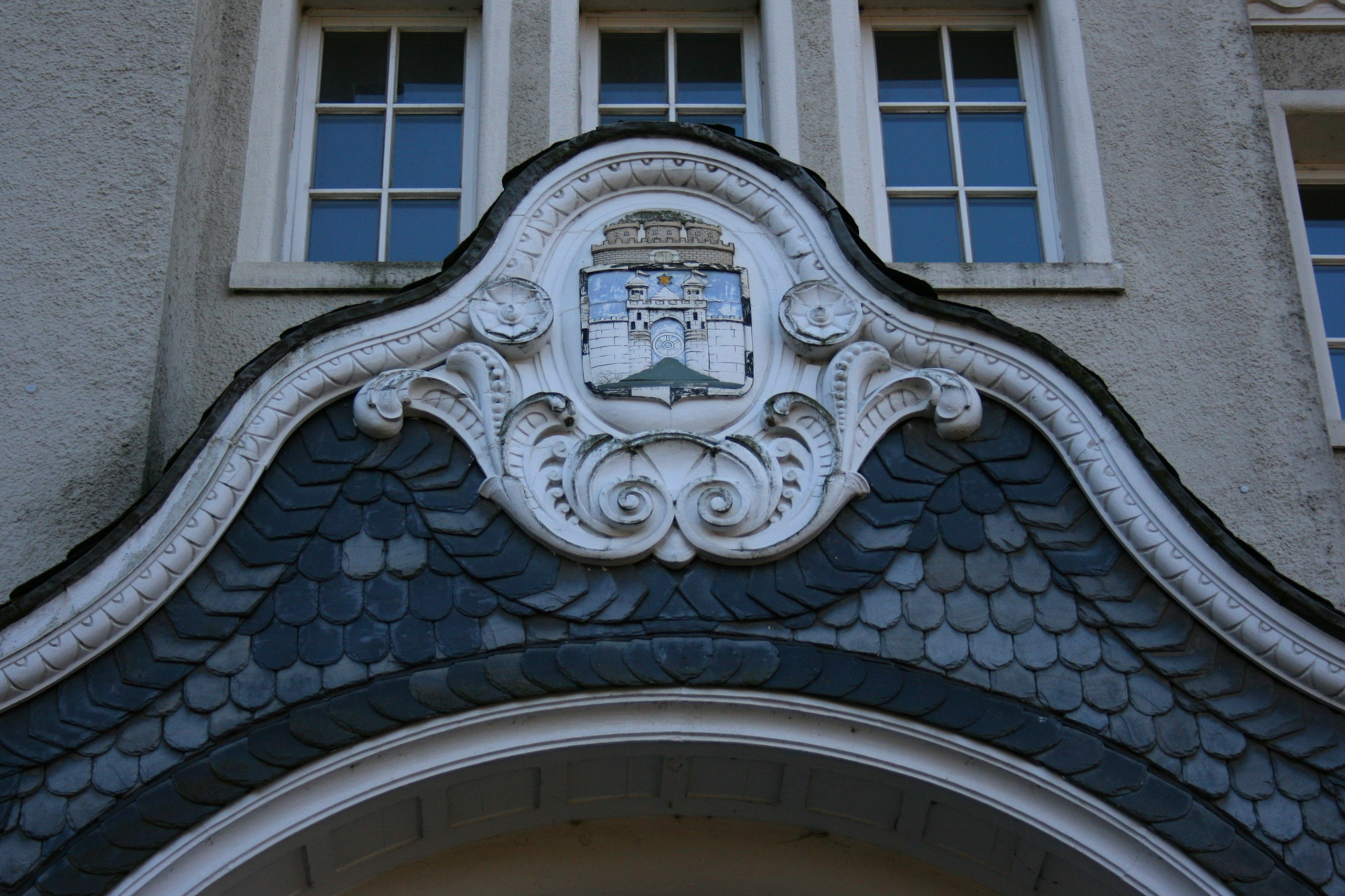 Museum Baden in Solingen-Gräfrath